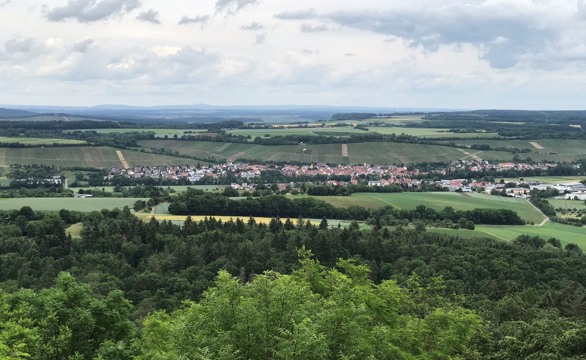 Pfaffenhofen ( Stromberg)